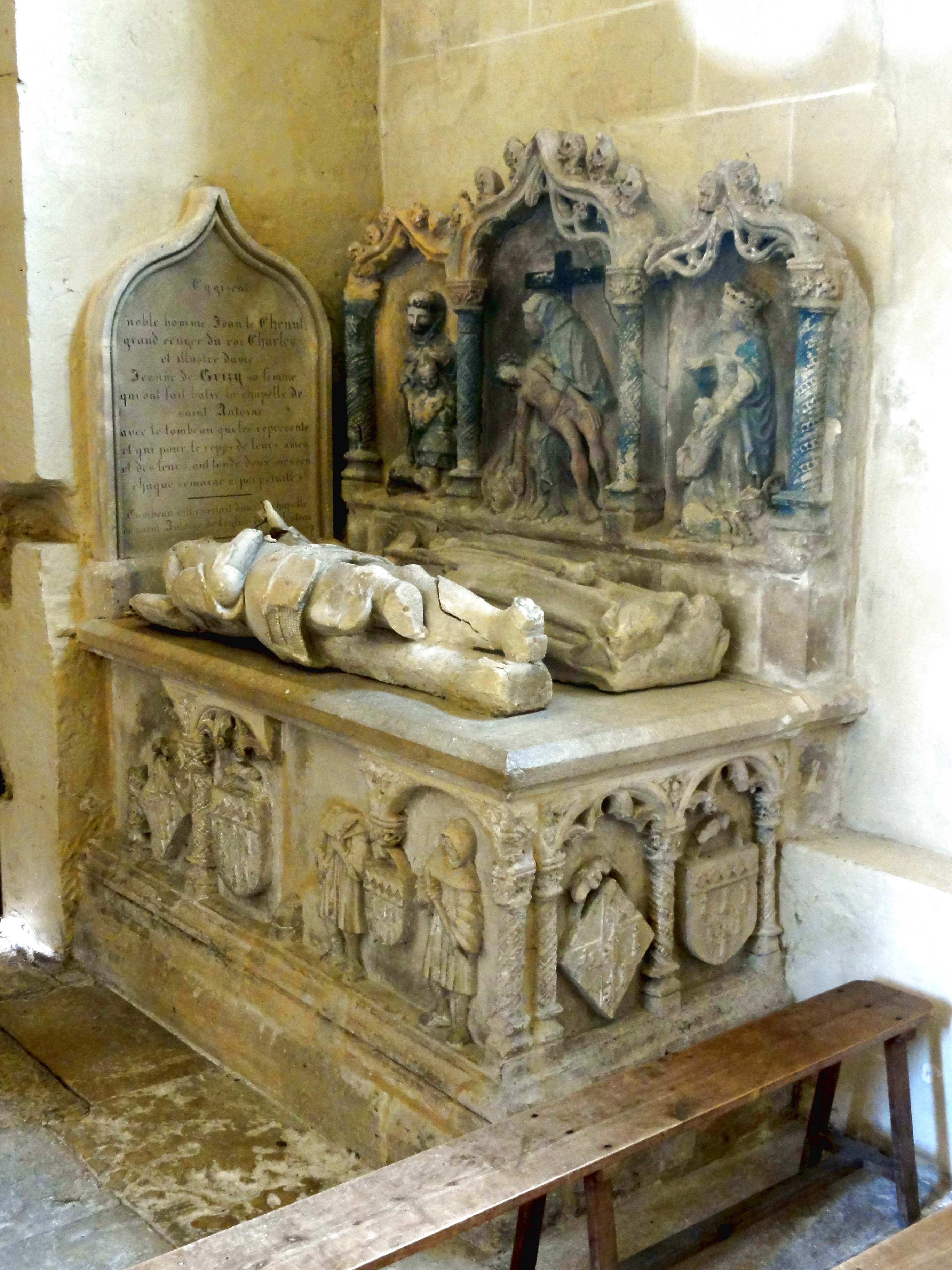 Monument funéraire de Jean Chenu et de sa femme.